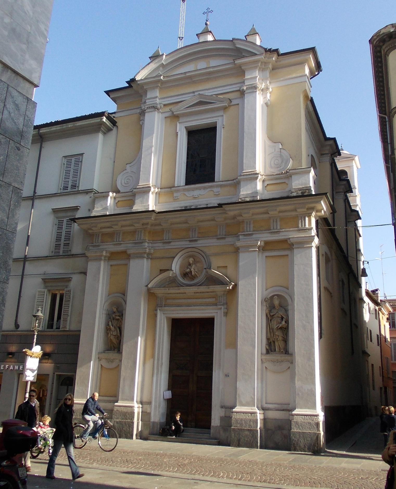 La facciata della chiesa di Santa Lucia a Parma